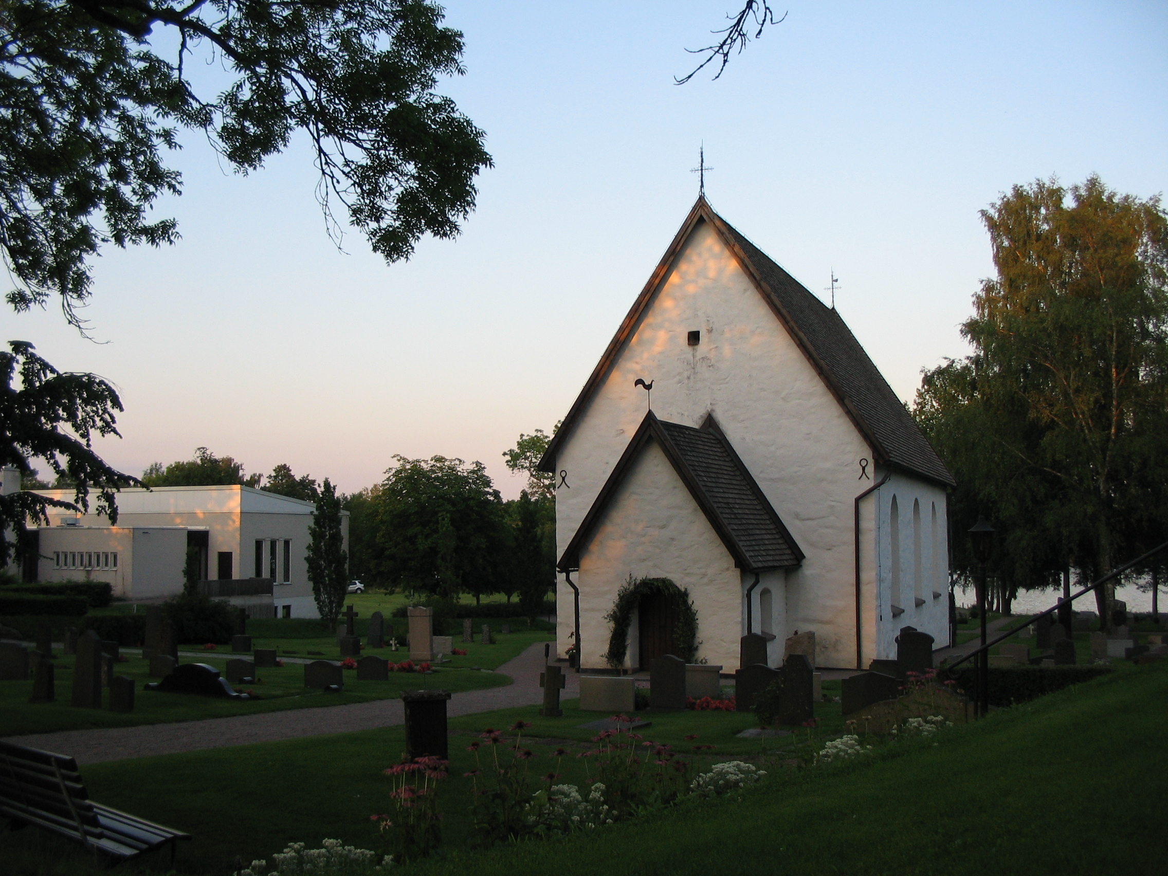 Öjaby kyrka, Småland